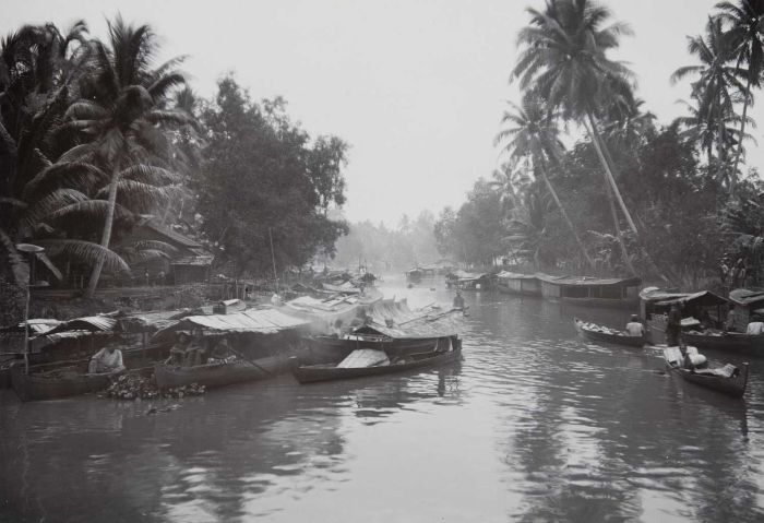 foto. De prauwen varen in de Soengei Koein (Sungai Kuin).. Riviergezicht met prauwen, Bandjermasin